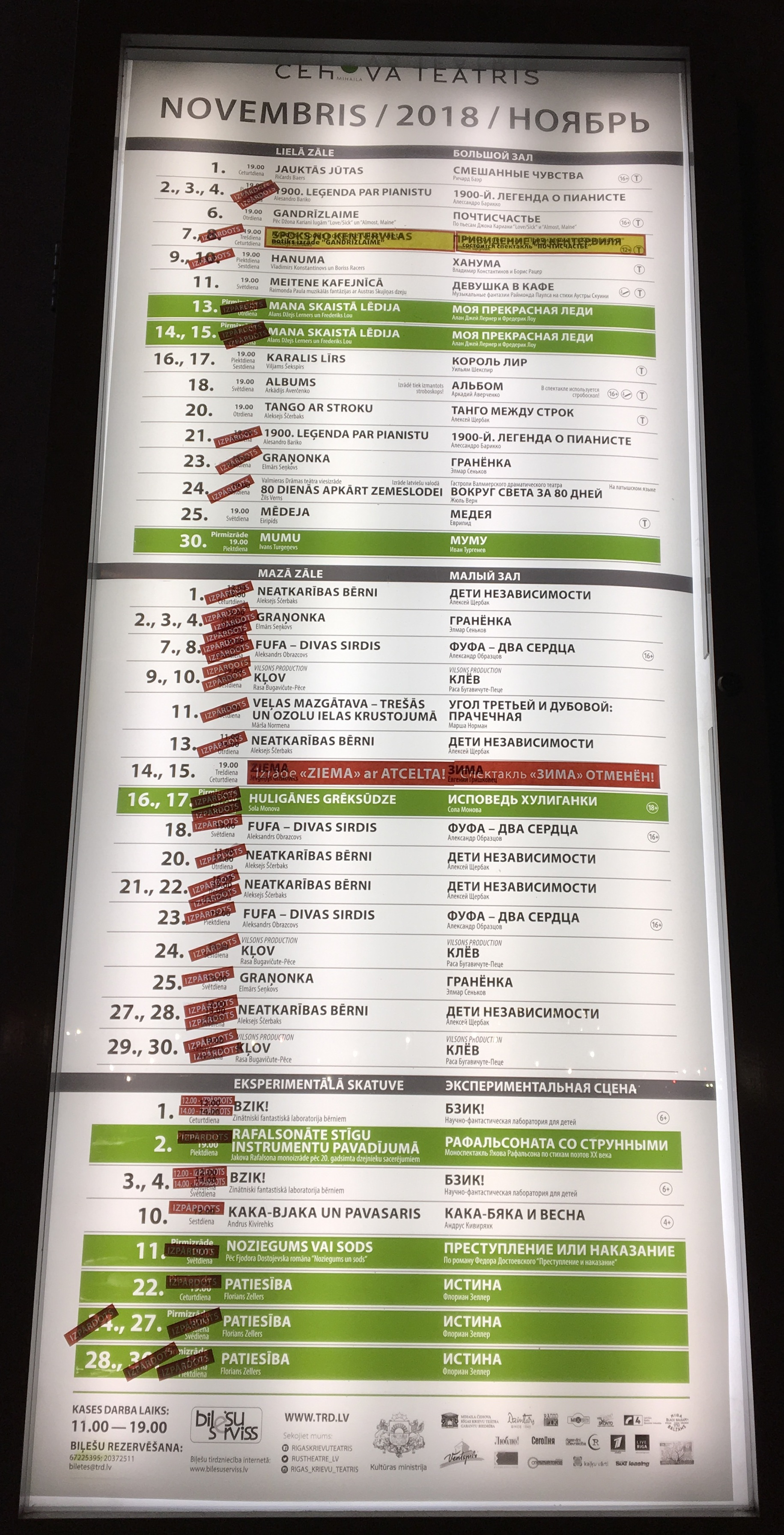 Spielplan des Mihaila Čehova Rīgas Krievu teātris (Rigaer Russisches Theater Michail Tschechow) vom November 2018. Rot markiert: ausverkaufte Vorstellungen